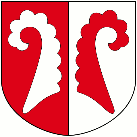 Wappen der Gemeinde Kematen in Tirol in Österreich